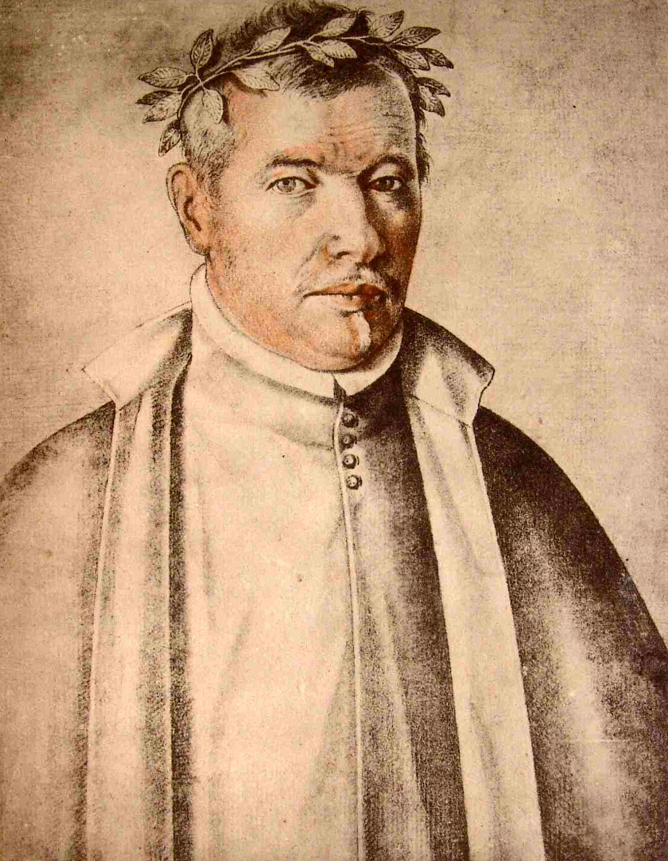 Retrato de Rodrigo Caro, por Francisco Pacheco. Puede acceder al libro completo en el siguiente enlace : Libro de descripción de verdaderos retratos de ilustres y memorables varones / escrito y dibujado por Francisco Pacheco. - Sevilla : Libreria Española y Extrangera de D. Rafael Tarasco, s.a